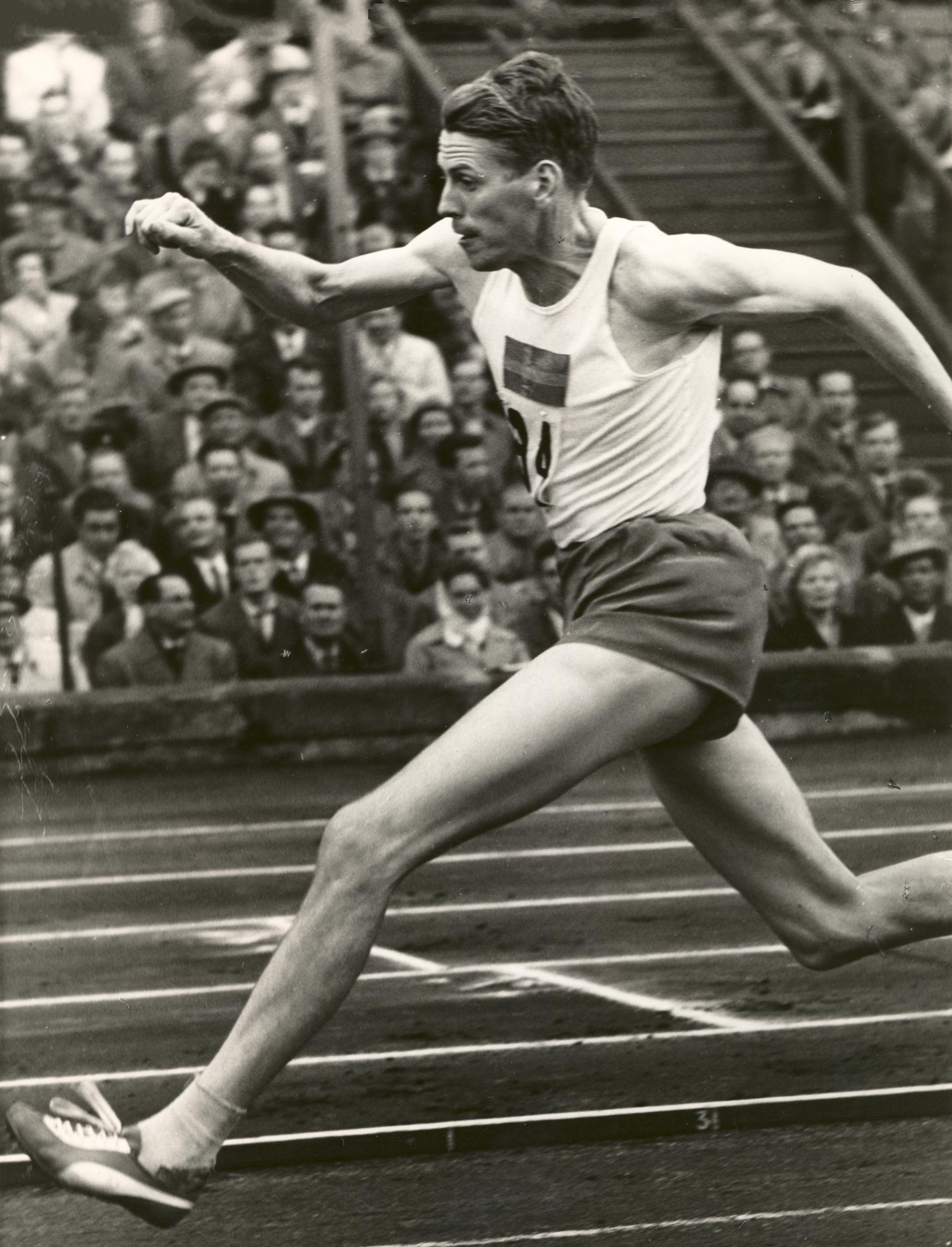 Roger Norman (jumper)